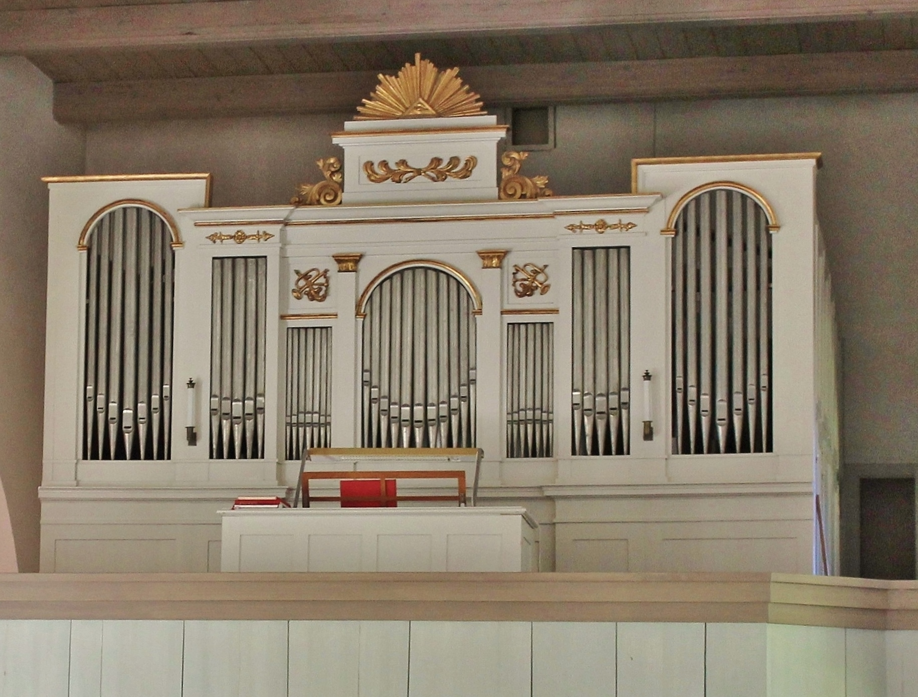 Orgeln med C.Elfströms fasad.